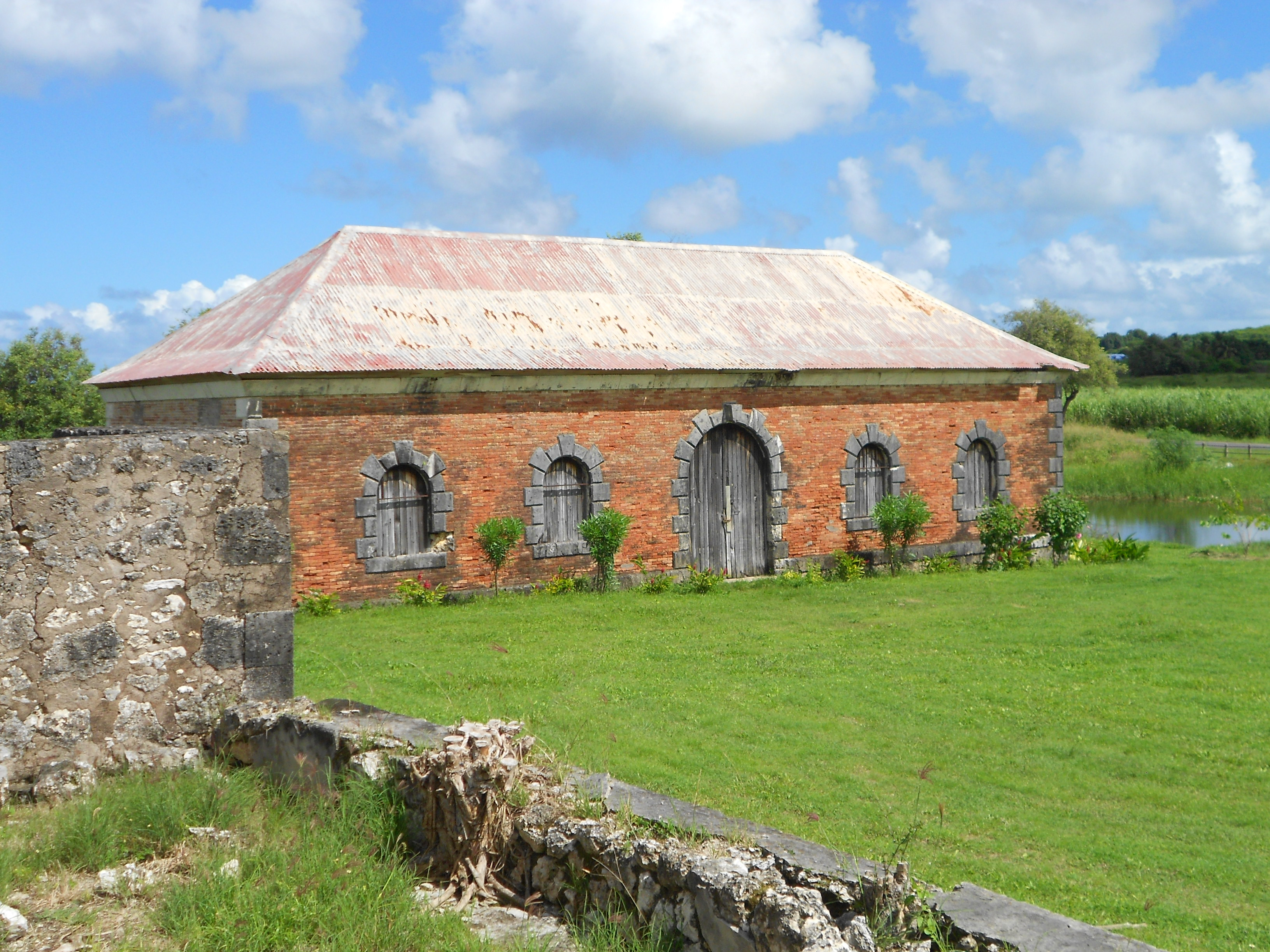 Avec le moulin, les écuries est le seul bâtiment qui demeure conservé